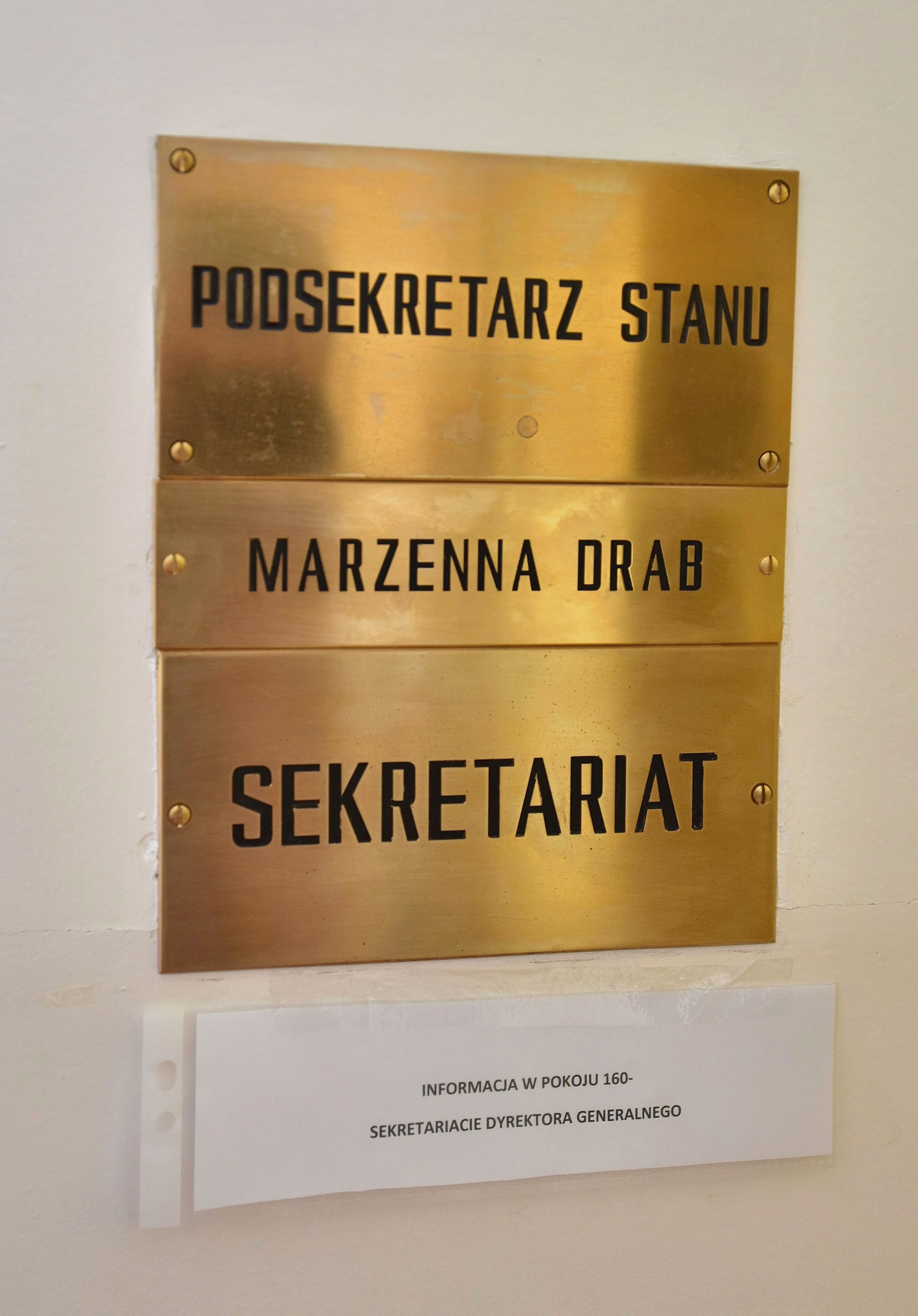 Tabliczka na drzwiach gabinetu podsekretarza stanu w Ministerstwie Edukacji Narodowej Marzenny Drab